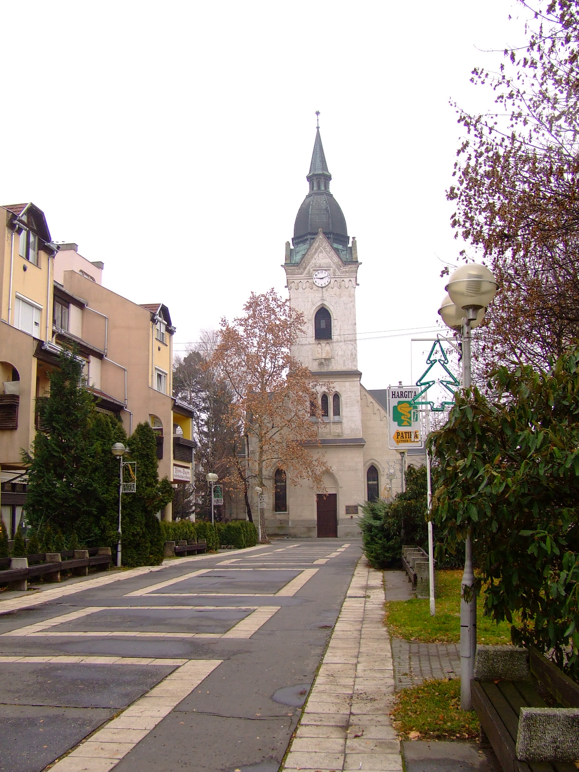 A kiskőrösi evangélikus templom. Épült 1793 és 1794 között. Itt keresztelték Petőfi Sándort 1823 január 1-jén